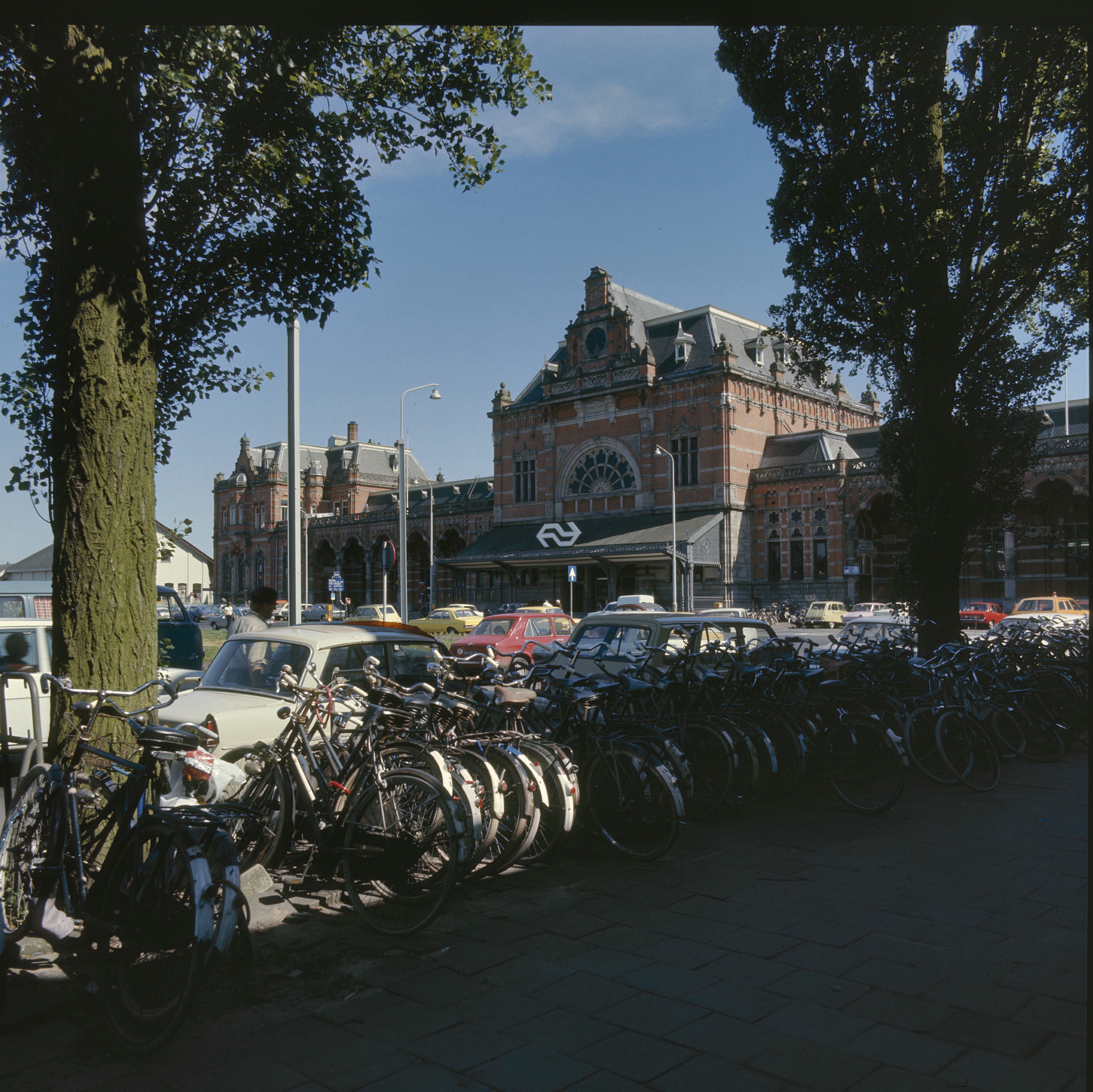 Station N.S.: overzicht van de voorgevel